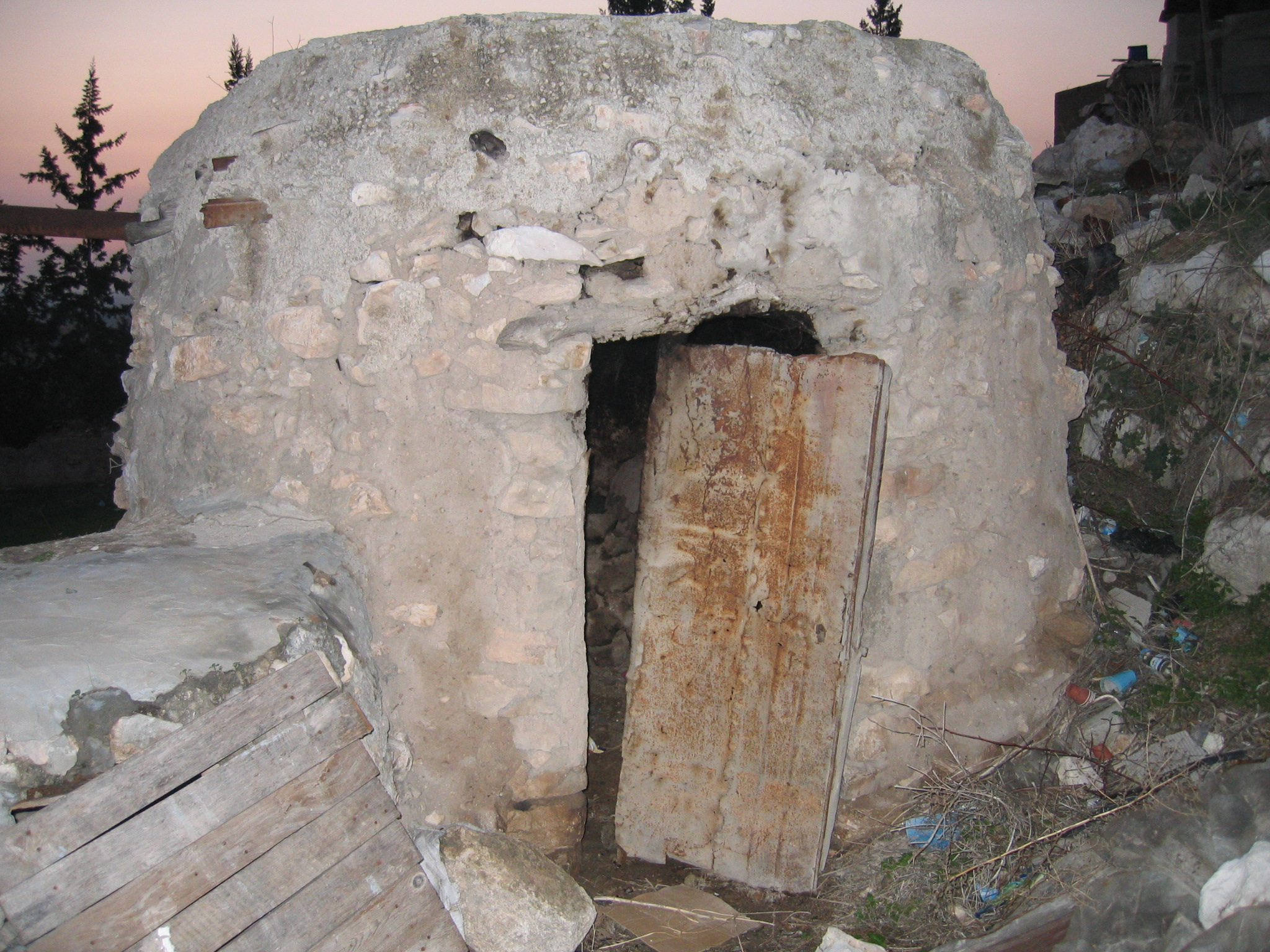 Taboon, Kufr Jammal, Palestine.